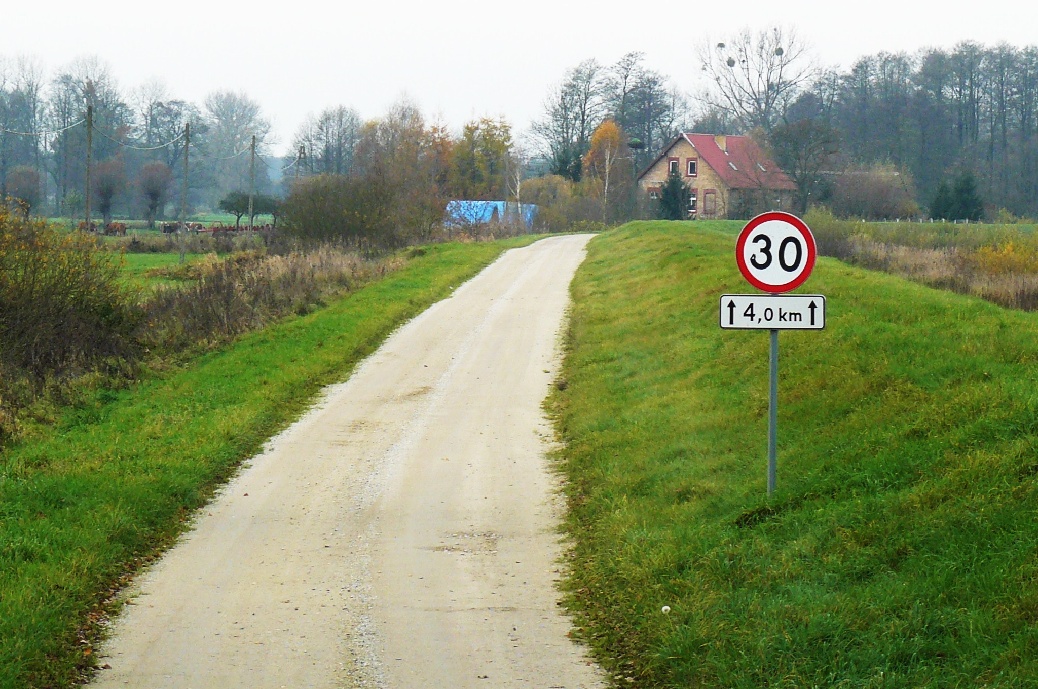 Lipki Małe.